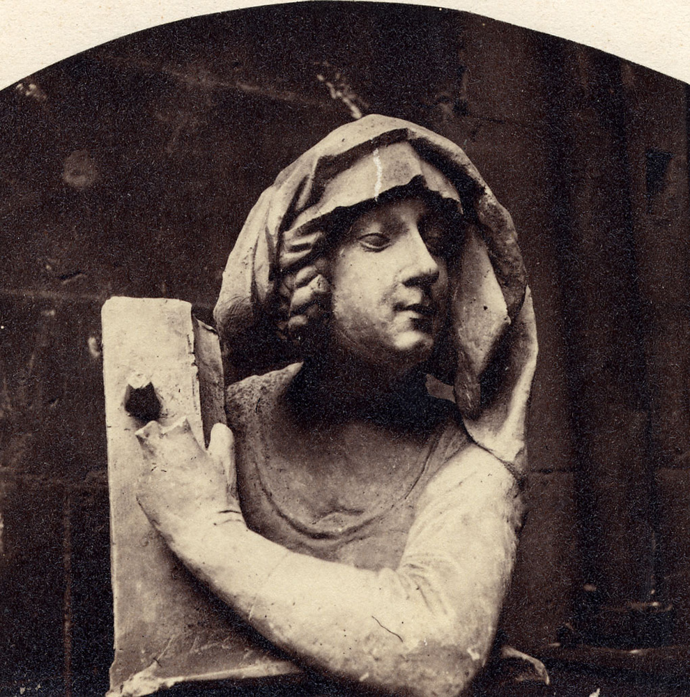 Charles-David Winter, Sculpture, Barbe d'Ottenheim, photographie sur papier salé, Musée d'art moderne et contemporain de Strasbourg.